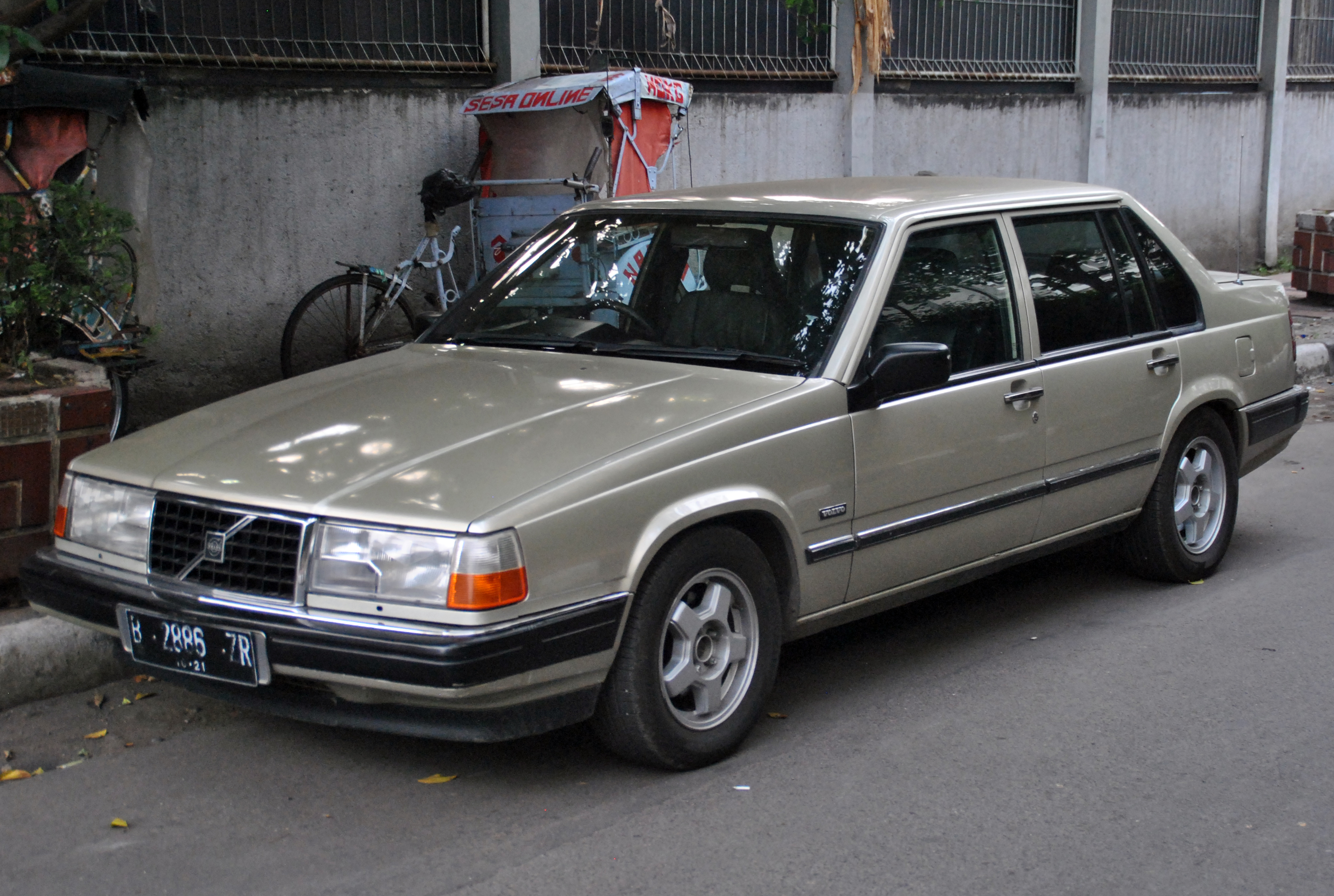 Location/lokasi: Bandung